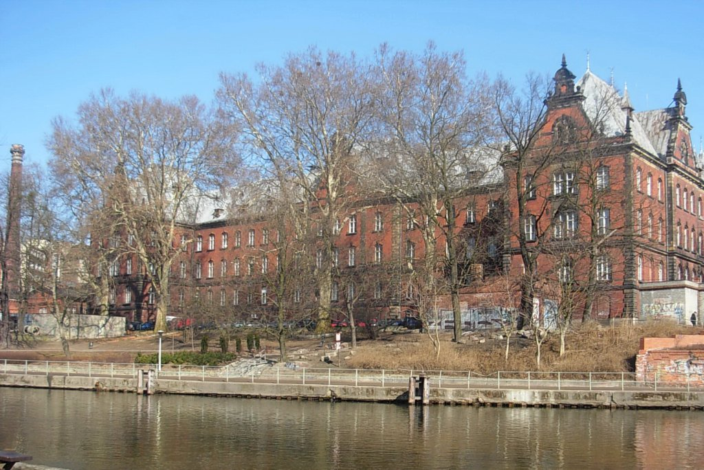 Platany - pomniki przyrody przed budynkiem dawnej Dyrekcji Kolei w Bydgoszczy